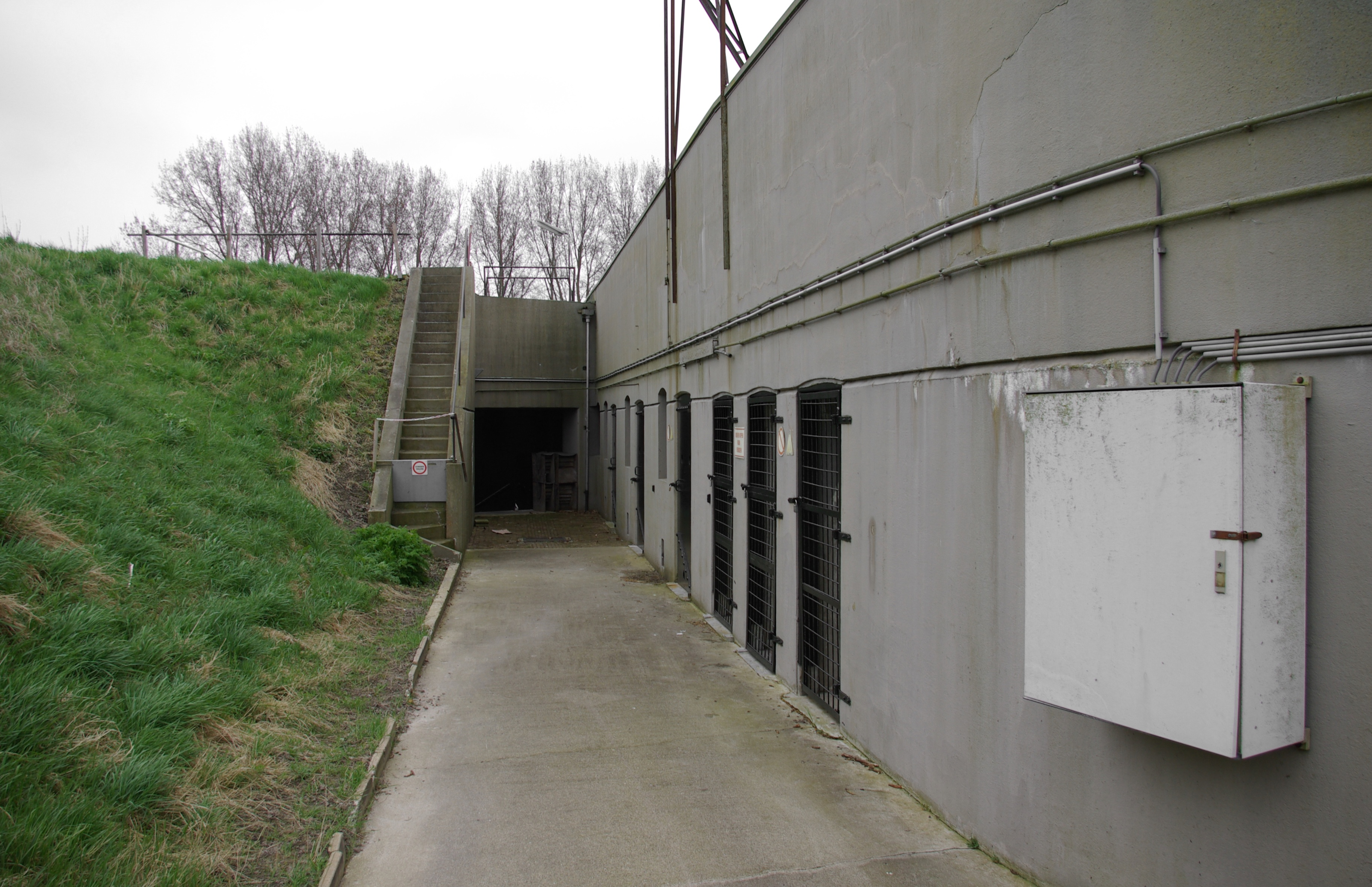 Stelling van Amsterdam: Fort bij Aalsmeer